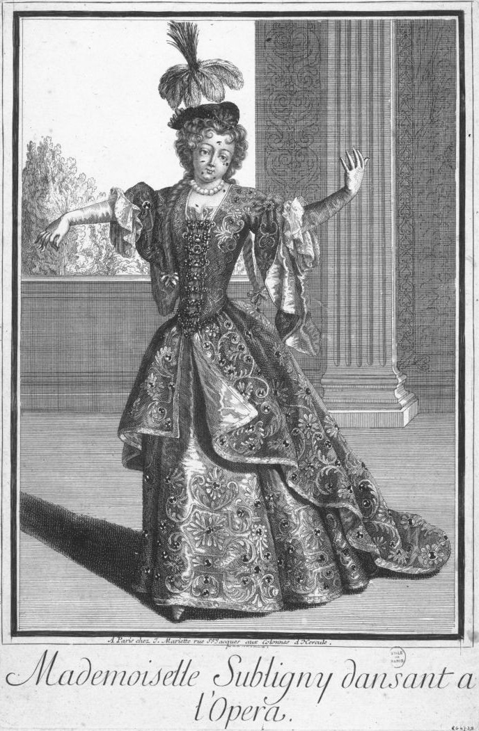 French dancer Marie-Thérèse Perdou de Subligny (1666-1735)